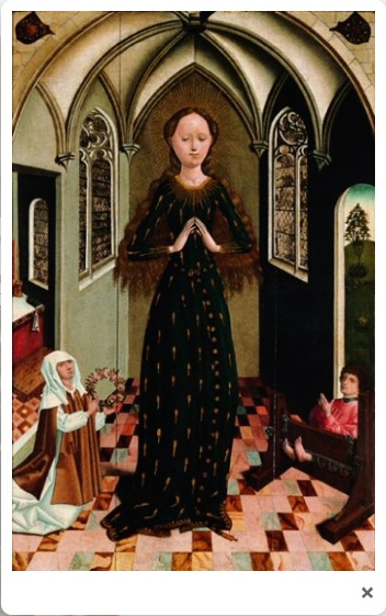 Exemplaire rare d'une Vierge vêtue d'une robe constellée d'épis de blés